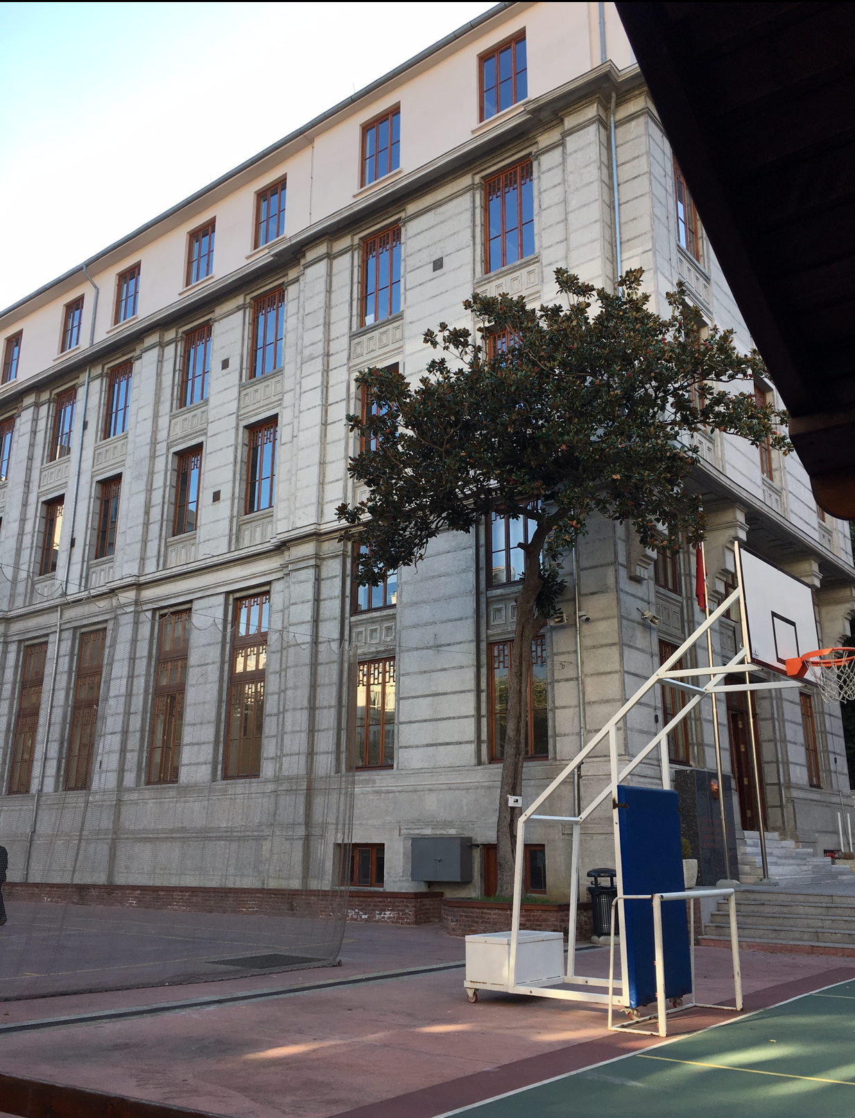 2016'da bitirilen restorasyon çalışmasının ardından okulun aldığı yeni görünüm